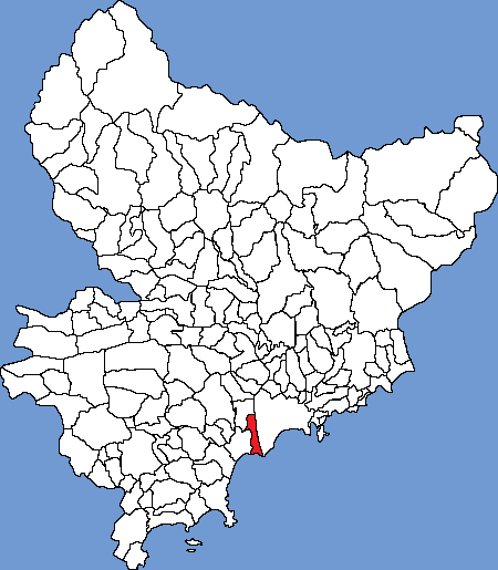 Location of St Laurent du Var in Alpes-Maritimes